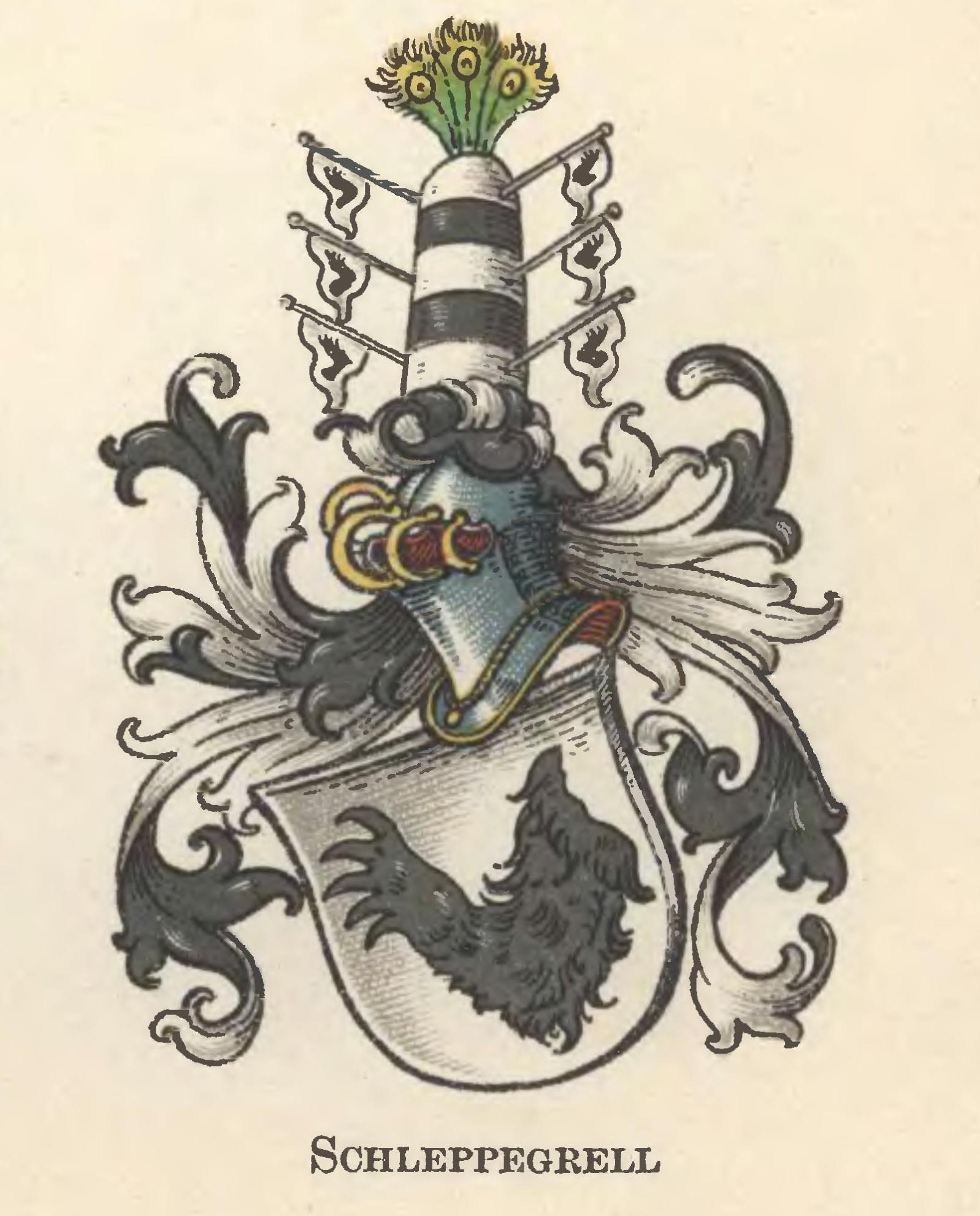 von Schlepegrell (v. Schleppegrell). Evangelisch. - Niedersächsischer Uradel